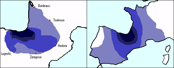 Comparaison linguistique et génétique du peuple basque. À Gauche : Limite d'extension du basque. À droite : Carte génétique des populations d'Europe de l'Ouest d'après Bertranpetit